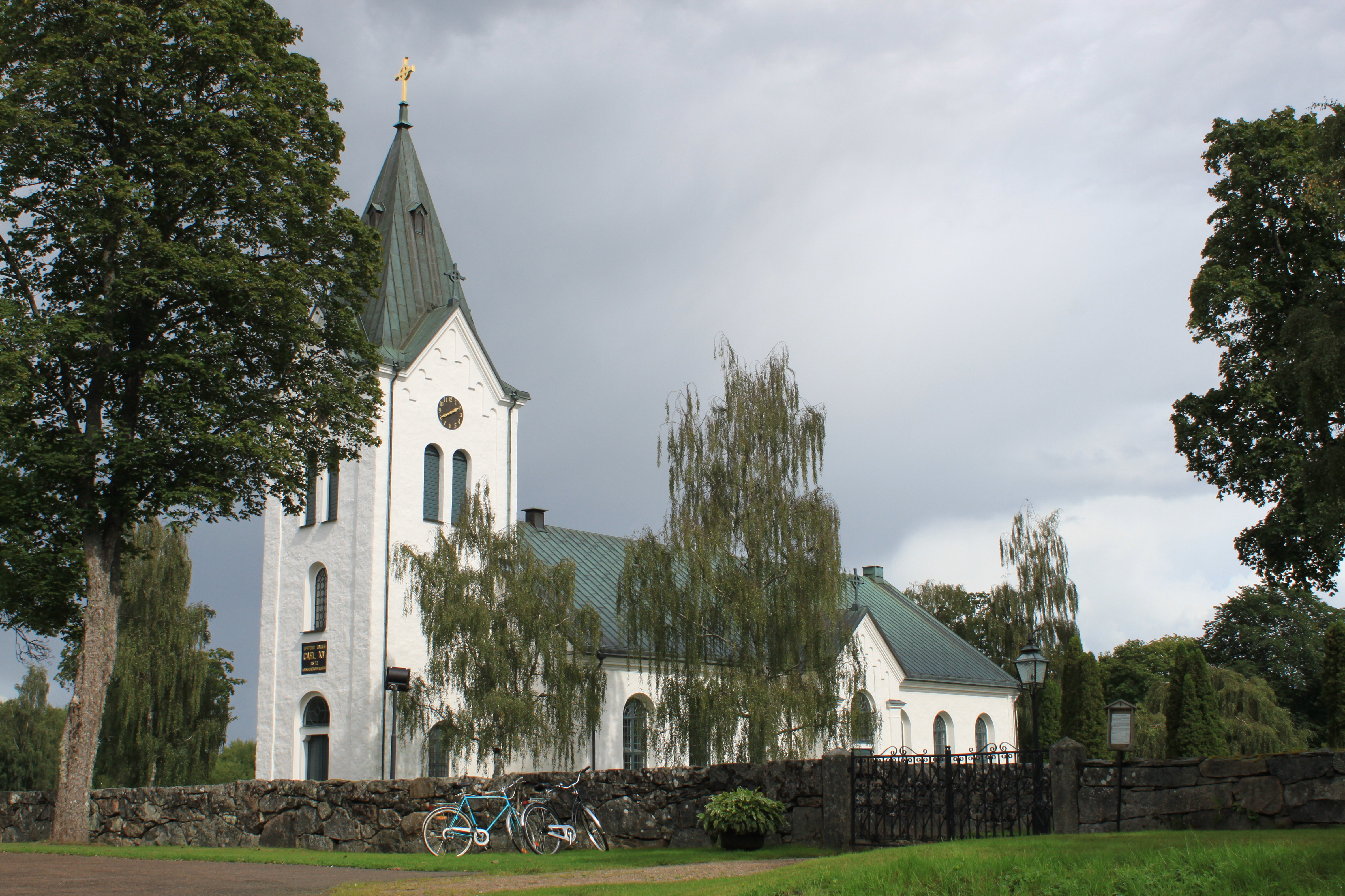 Agunnaryds kyrka